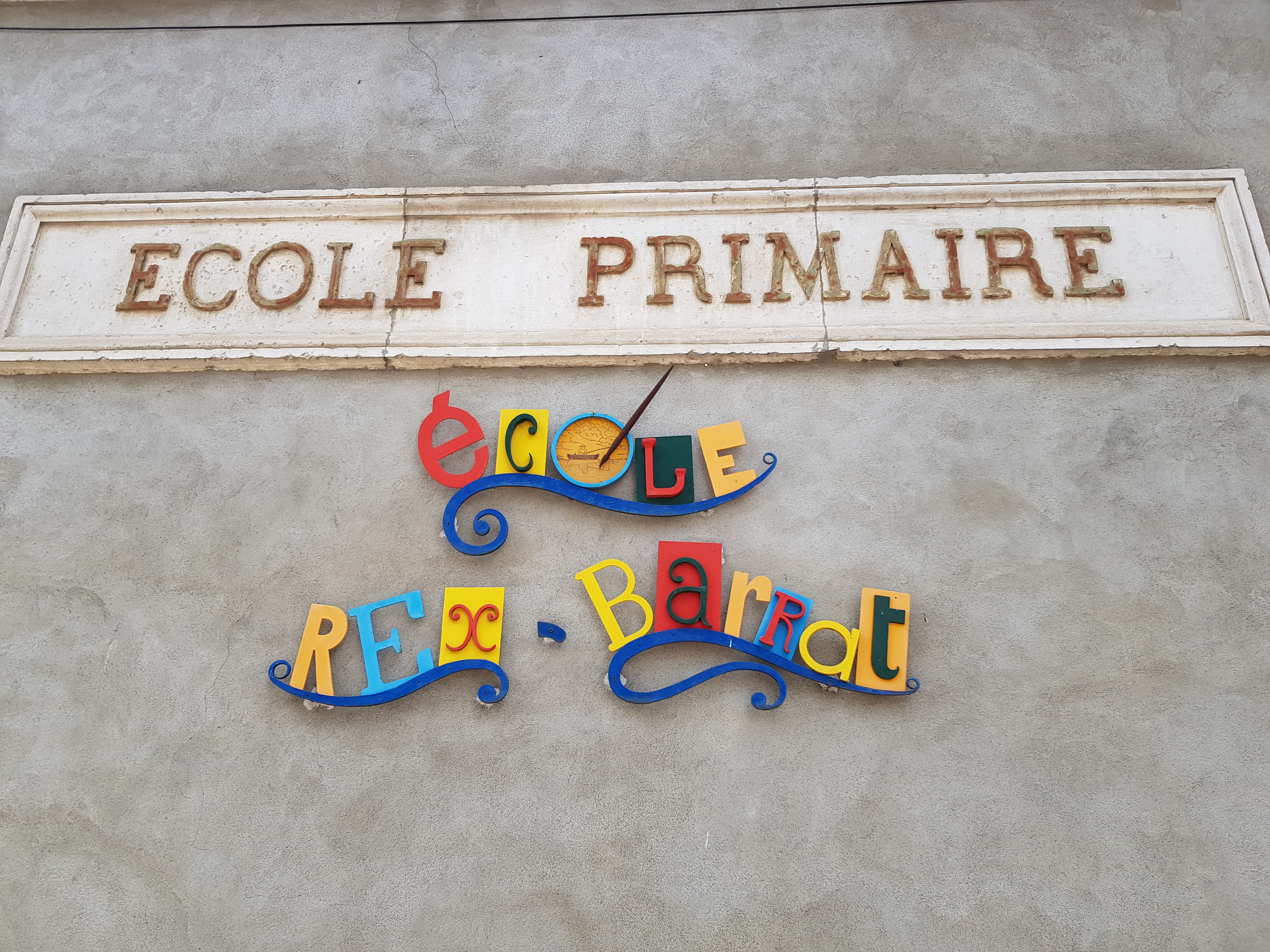 Ecole Rex-Barrat, Varzy (58).